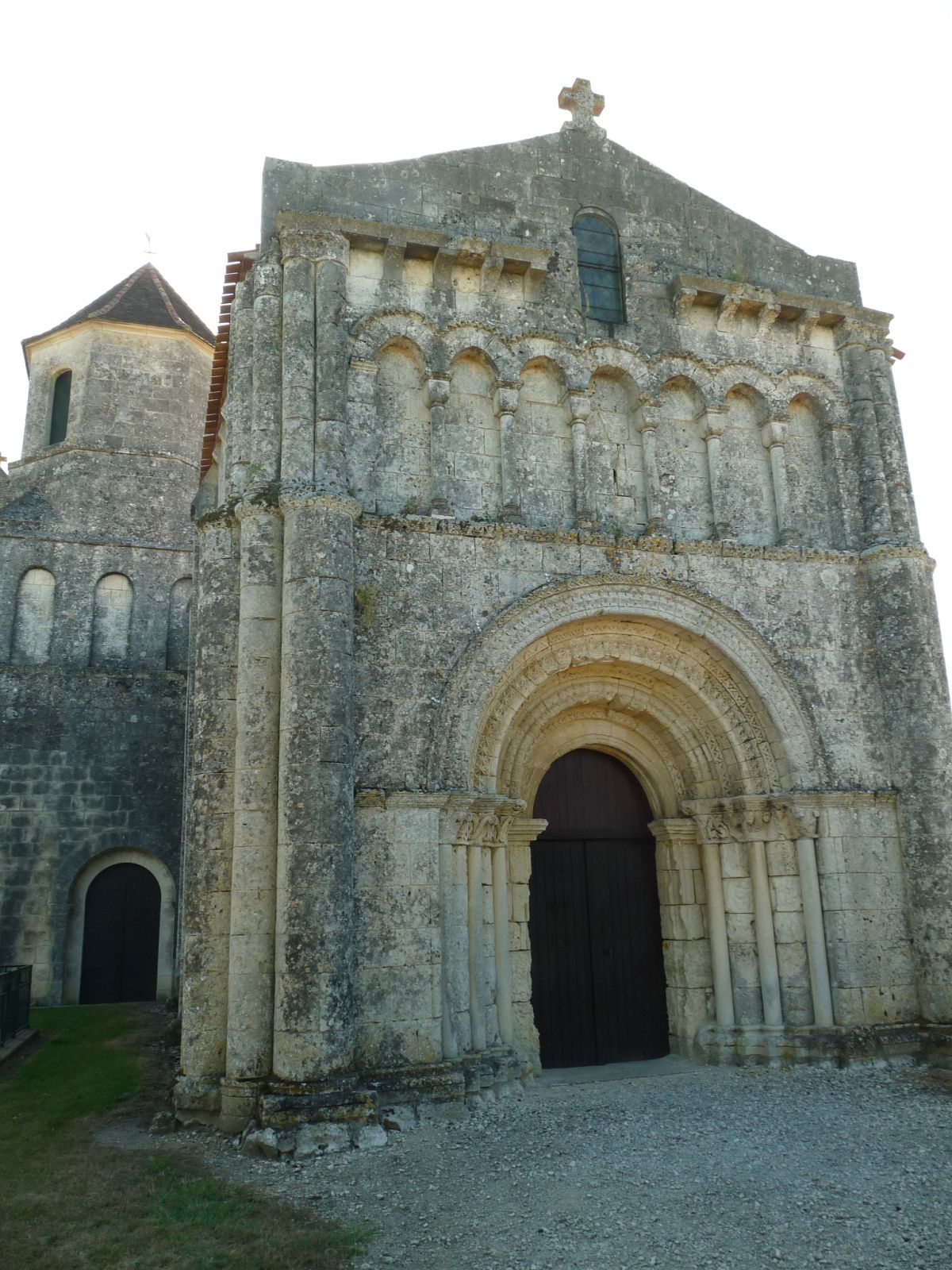 église de Saint-Simon-de-Pellouaille (17), France